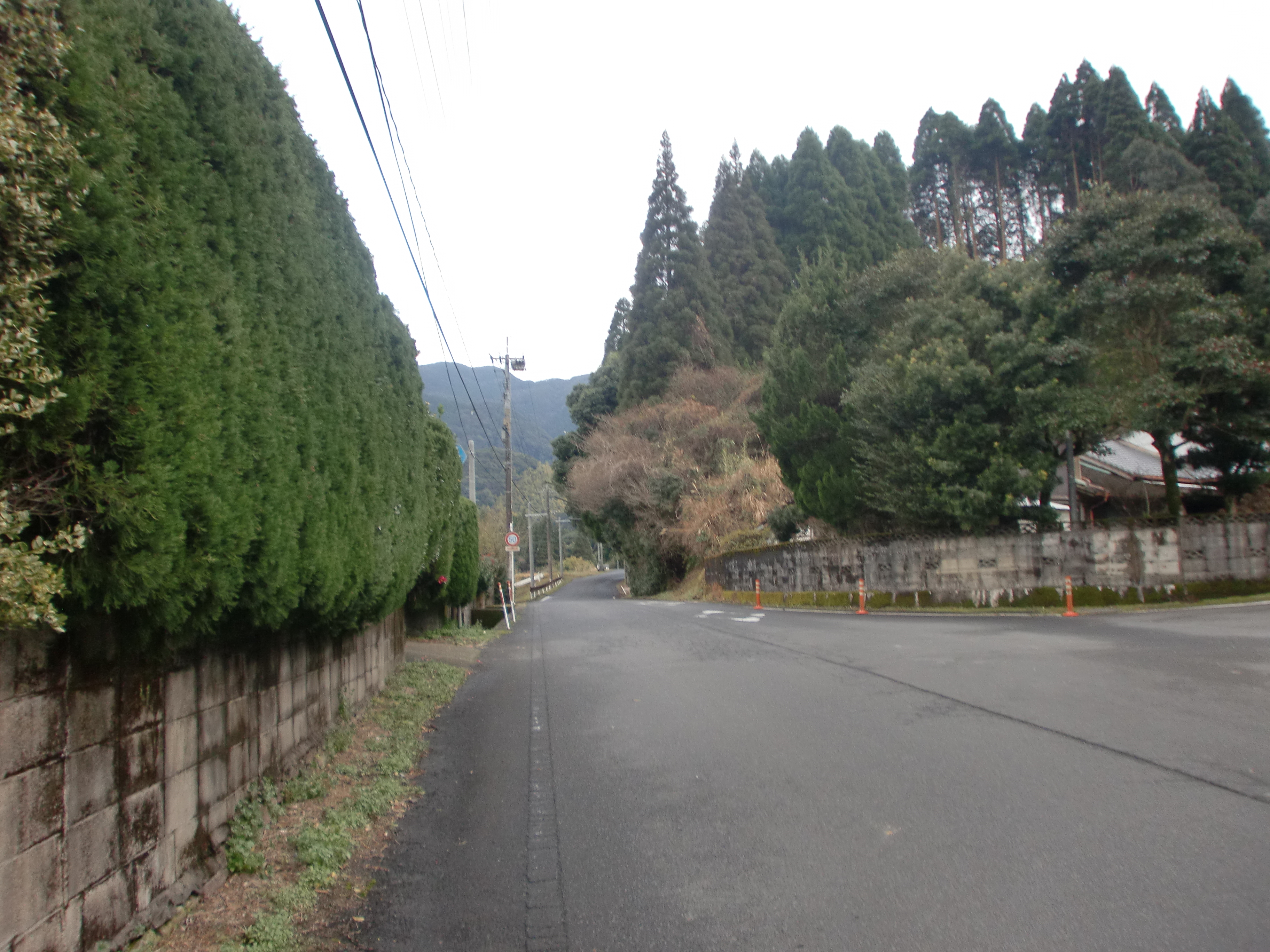 鹿児島県道36号川内郡山線を県道304号仙名伊集院線との交差点から郡山方面を望む。